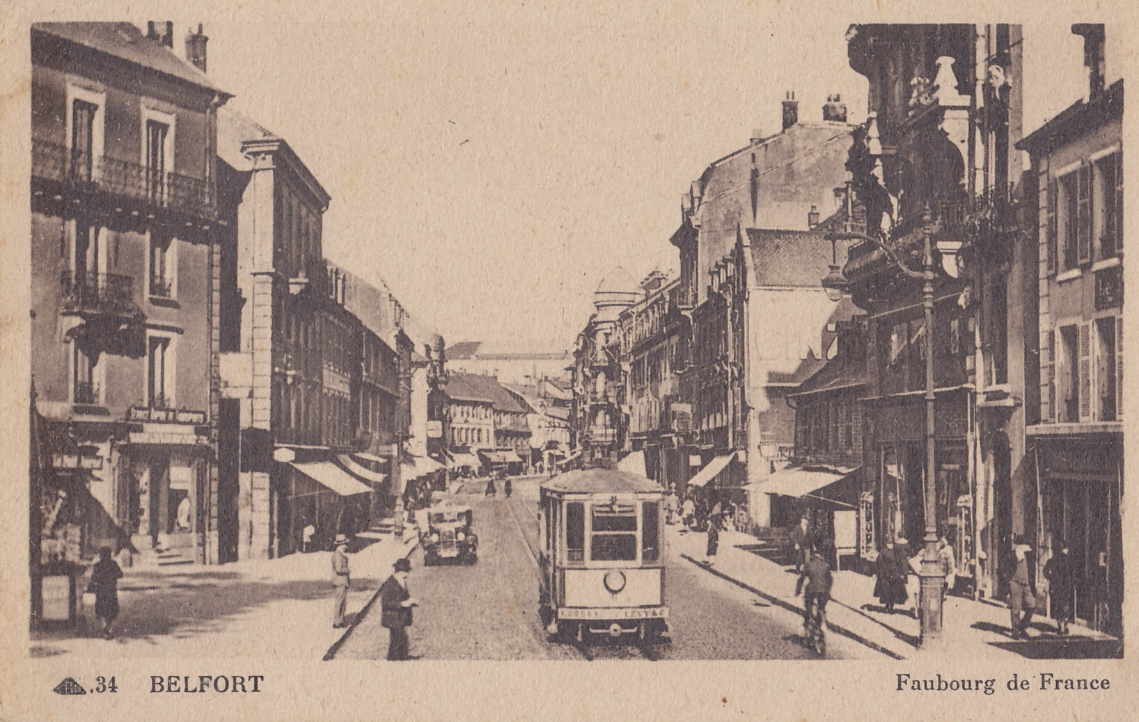 Carte postale ancienne éditée par Brard / CAP, n°34 :BELFORT - Faubourg de France